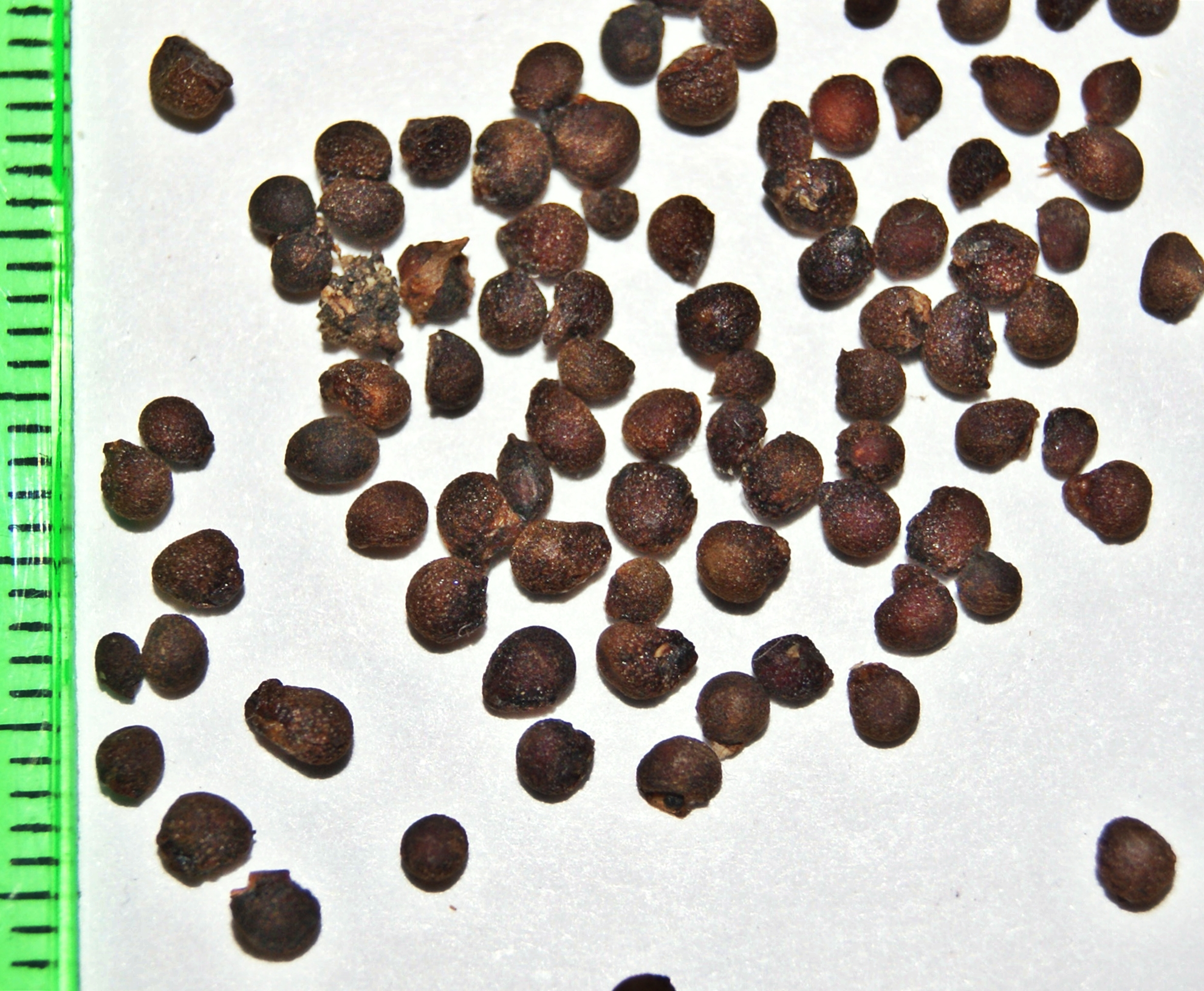 Herbst-Zeitlose (Colchicum autumnale), Samen; Herbstzeitlosensamen, Semen Colchici. Größenvergleich: 1mm-Skalierung.